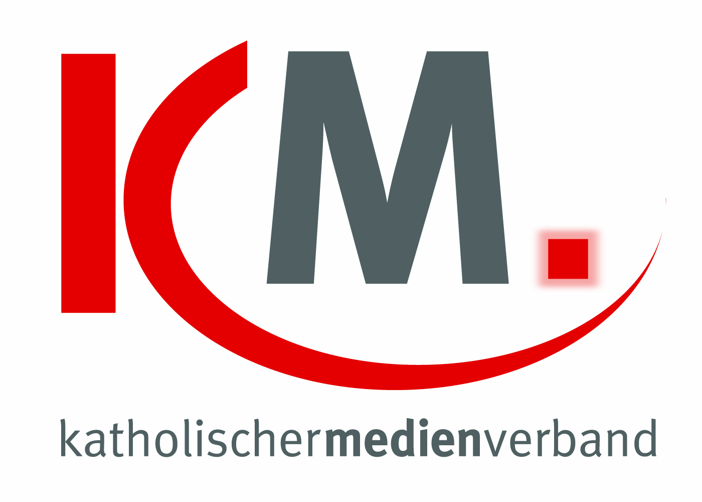 Logo (Wortbildmarke) des Katholischen Medienverbandes